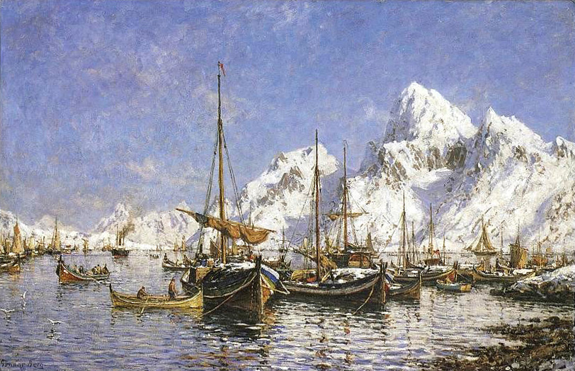 «From Vaterfjord» near Svolvær Lofoten Islandslabel QS:Len,"«From Vaterfjord» near Svolvær Lofoten Islands"